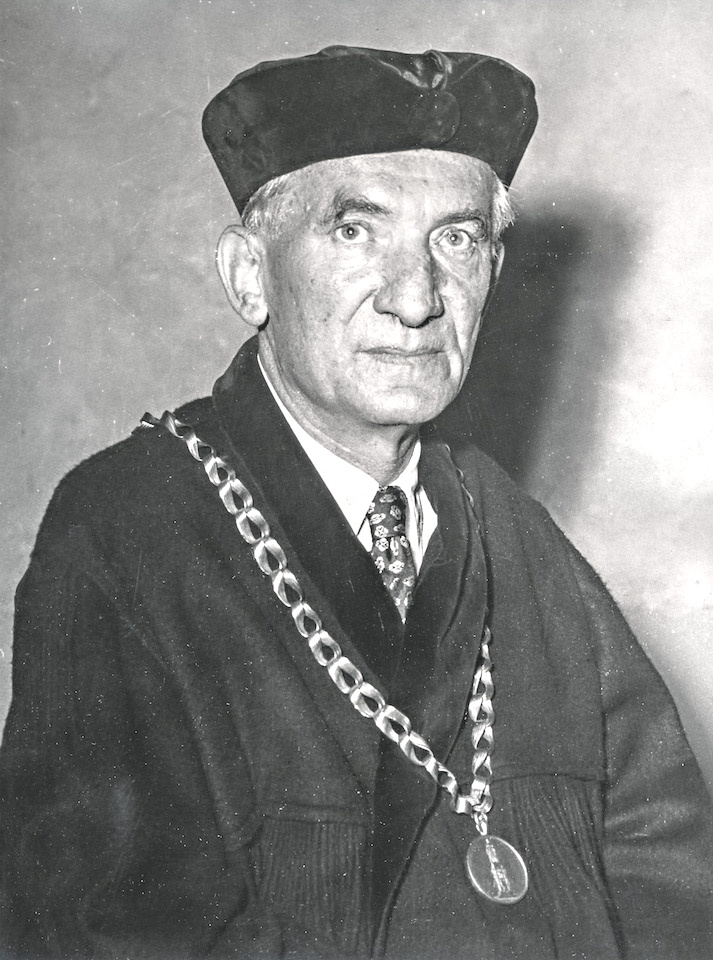 František Neuwirth, UK Praha (datum na scanu je hrubý odhad)